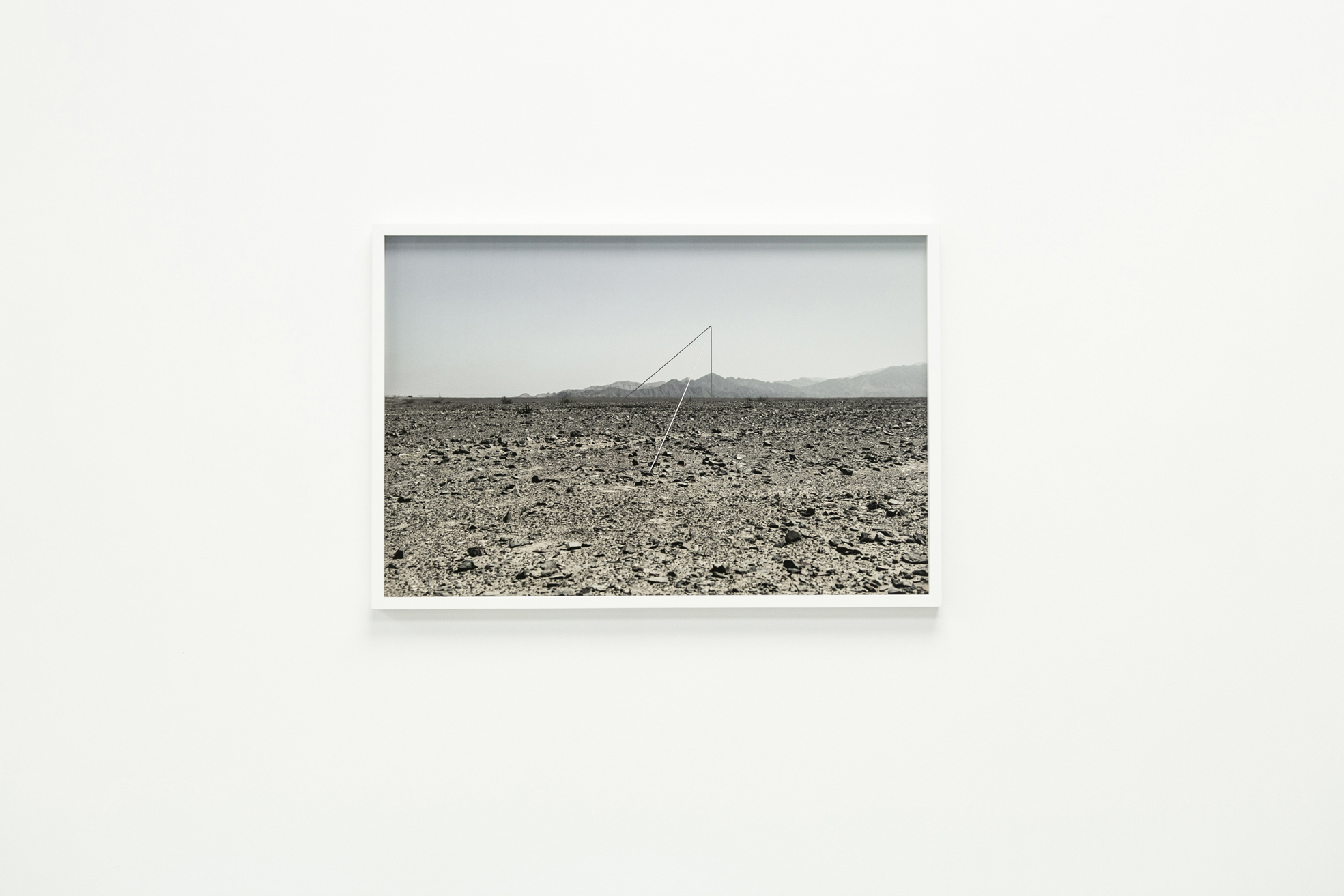 Michał Smandek, Wywoływanie rzeźby, Szkielety, widok wystawy, Galeria Miejska BWA w Bydgoszczy, 2018